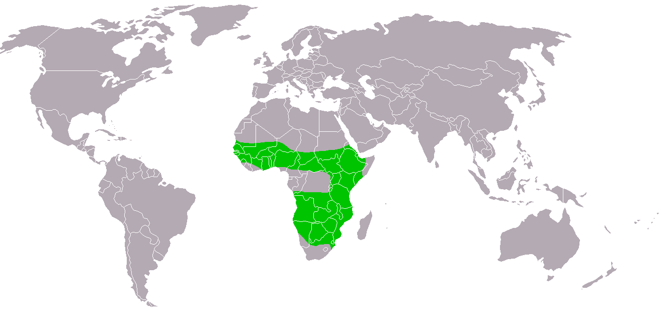 Gaukler (Terathopius ecaudatus) quelle: Selber Lizenz